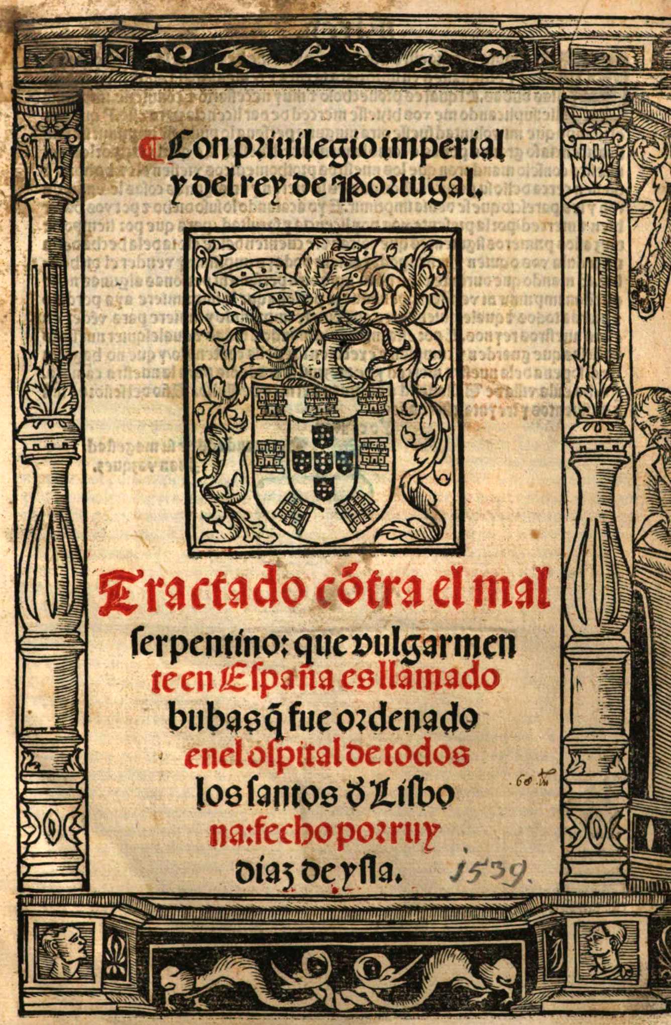 Titelblatt